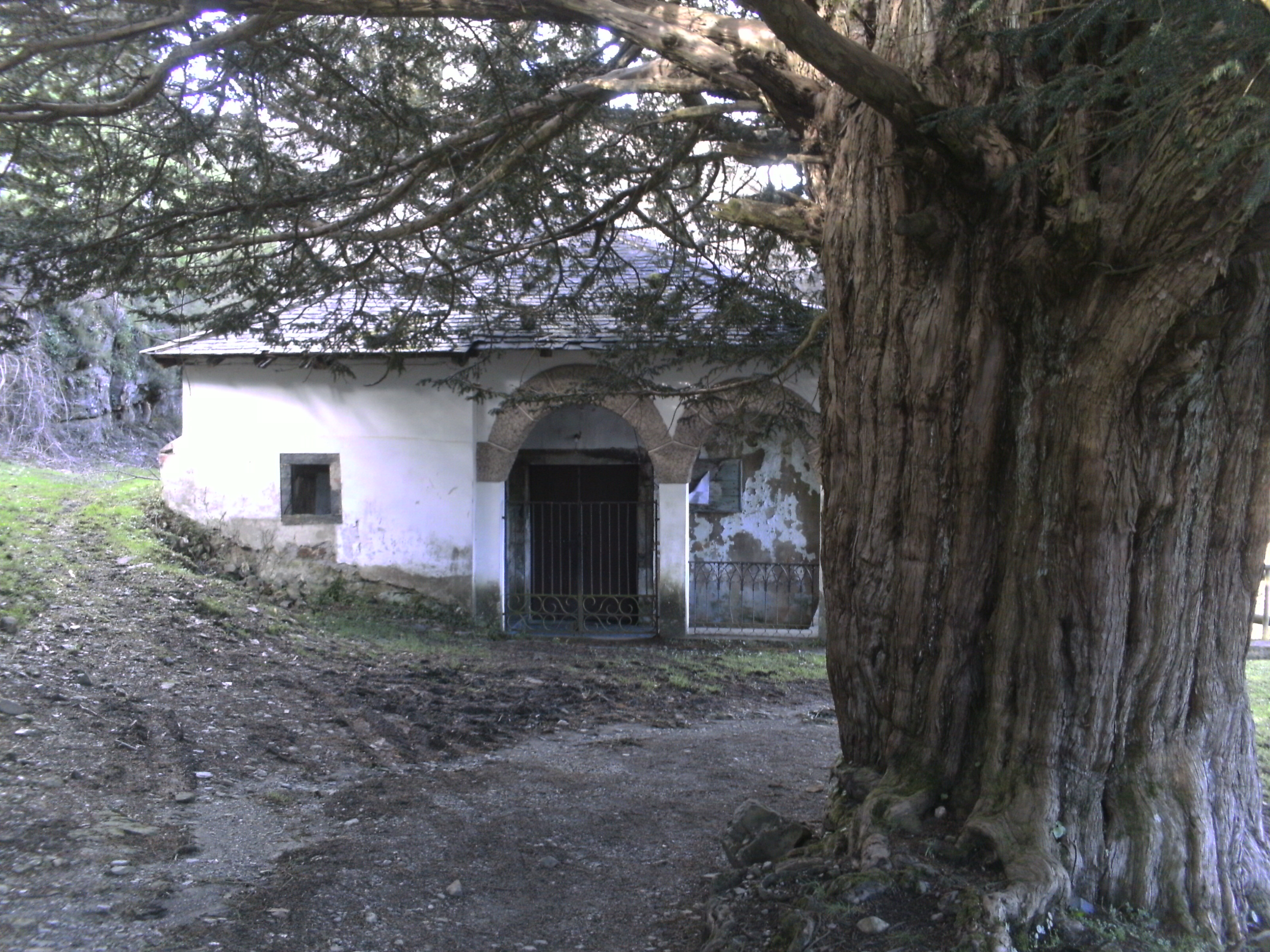 Ermita y texu de Santa Colomba (Ayande)